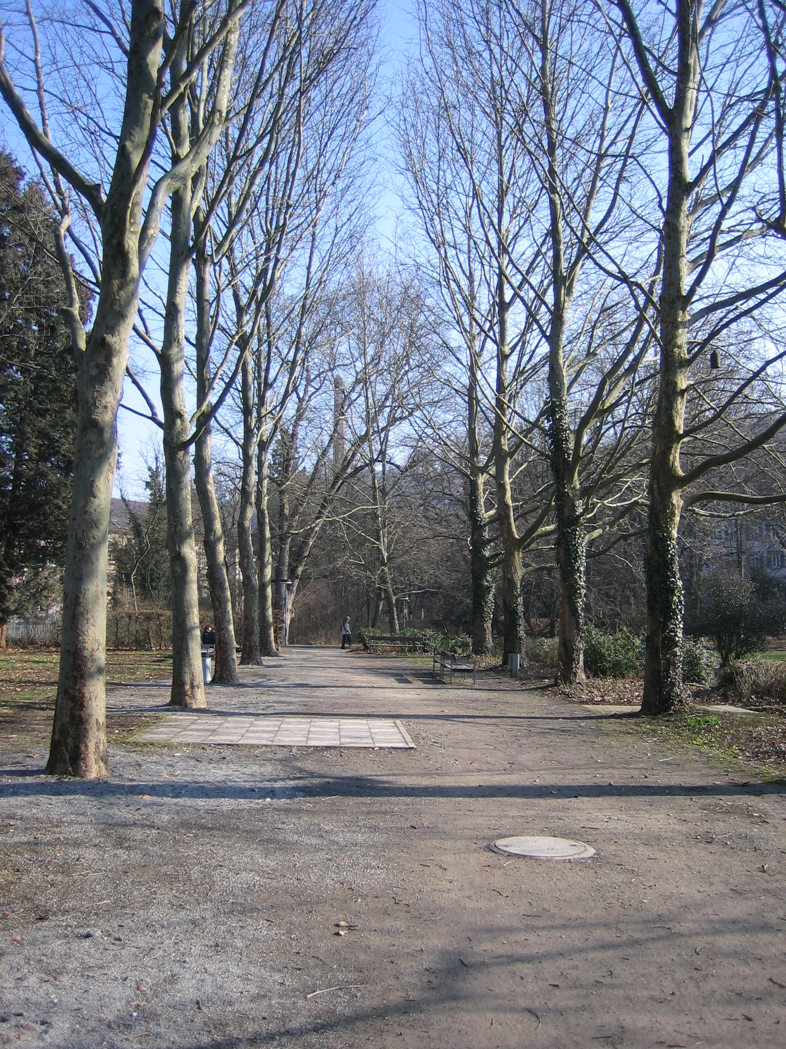 Plattanenallea an Stelle der früheren Orangerie im Botanische Garten in Tübingen